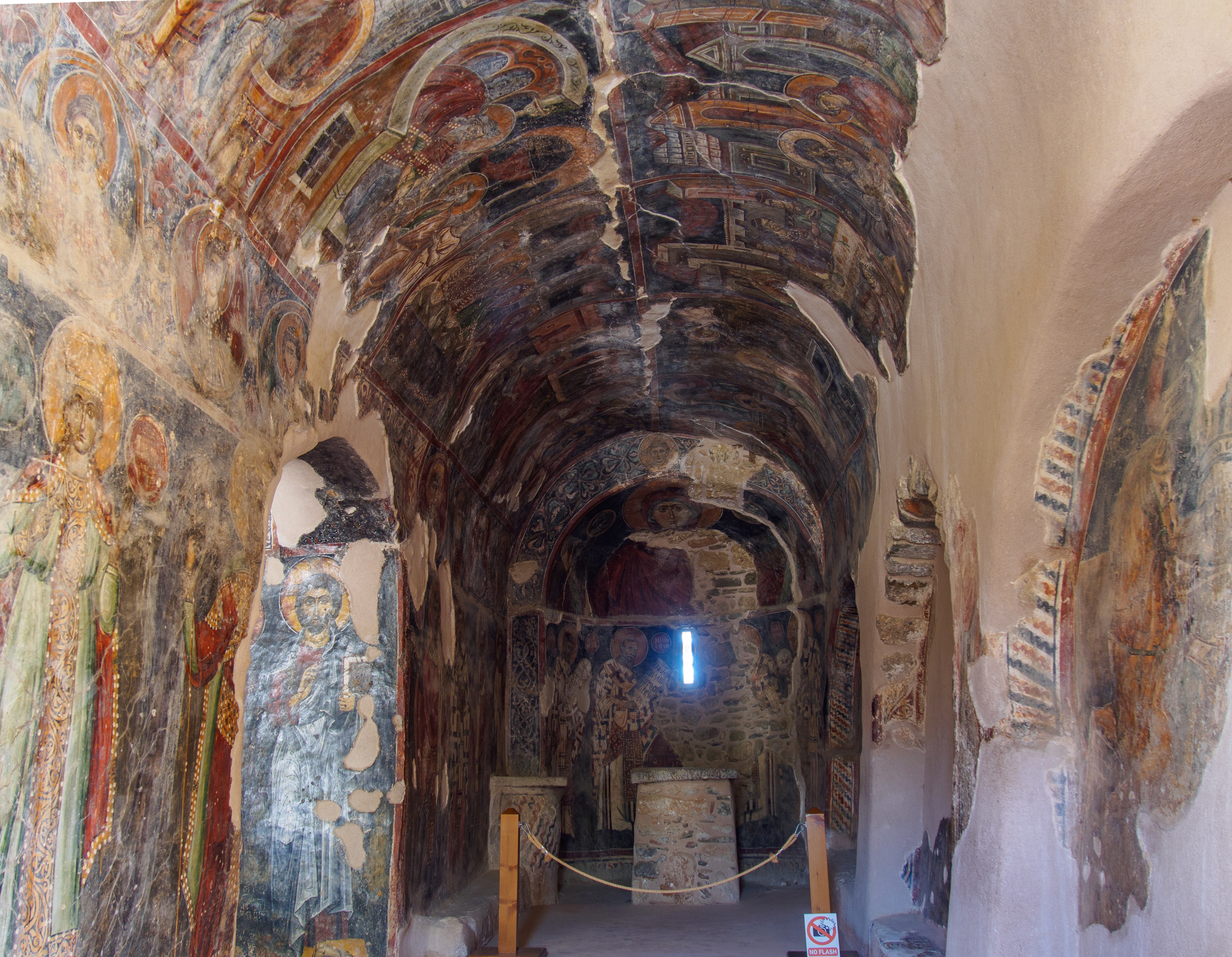 Ναός Παναγίας Κεράς Κριτσάς«Ναός Παναγίας Κεράς Κριτσάς»